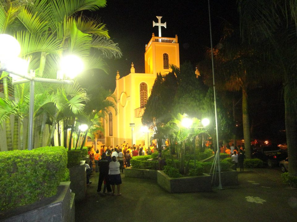 Igreja de Nossa Senhora Aparecida em Itatiba, durante um evento noturno.